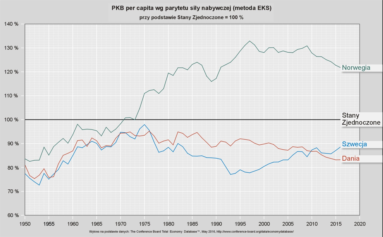 PKB per capita wg parytetu siły nabywczej państw skandynawskich przy podstawie Stany Zjednoczone = 100%. Wykres na podstawie danych: The Conference Board Total Economy Database™, May 2016, - "Output, Labor, and Labor Productivity, 1950-2016" (GDP-Capita EKS).